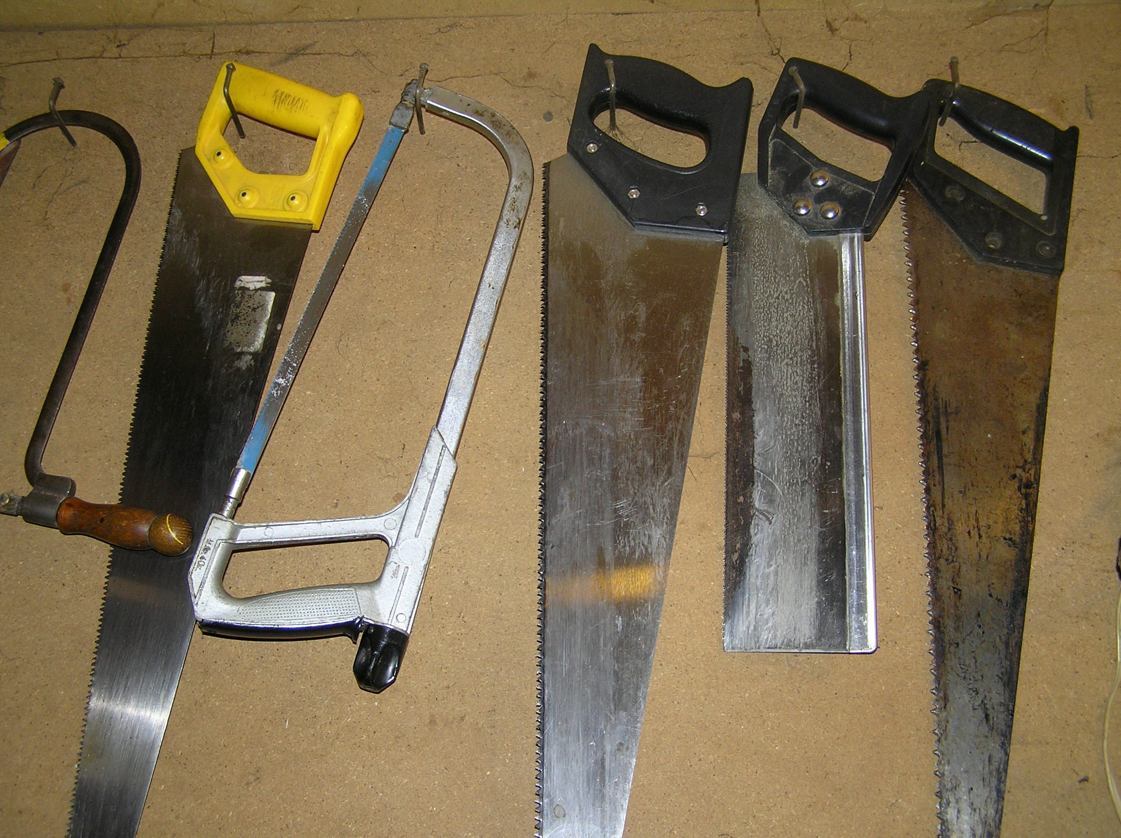 Handsaws